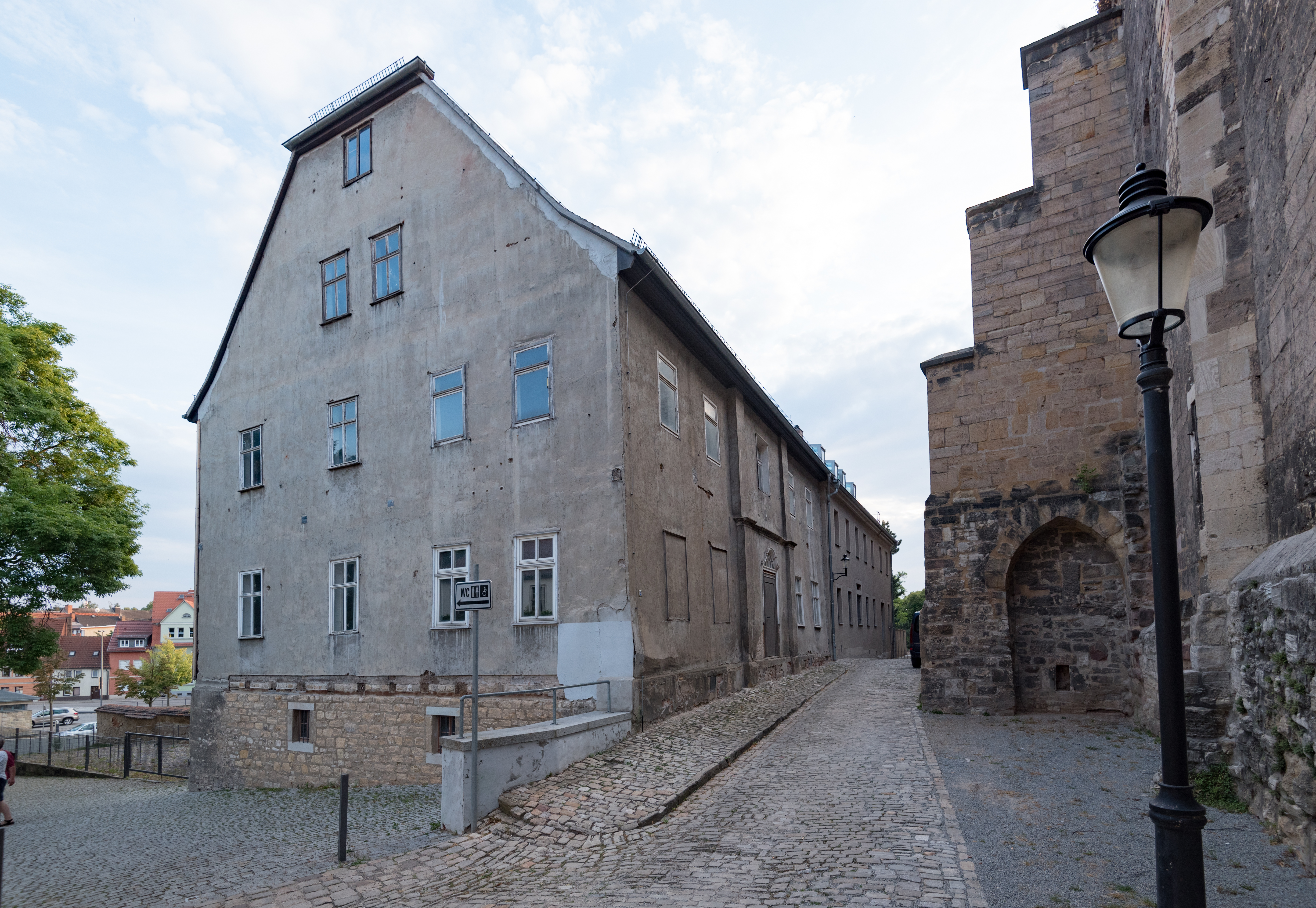 Naumburg (Saale), Domplatz 20